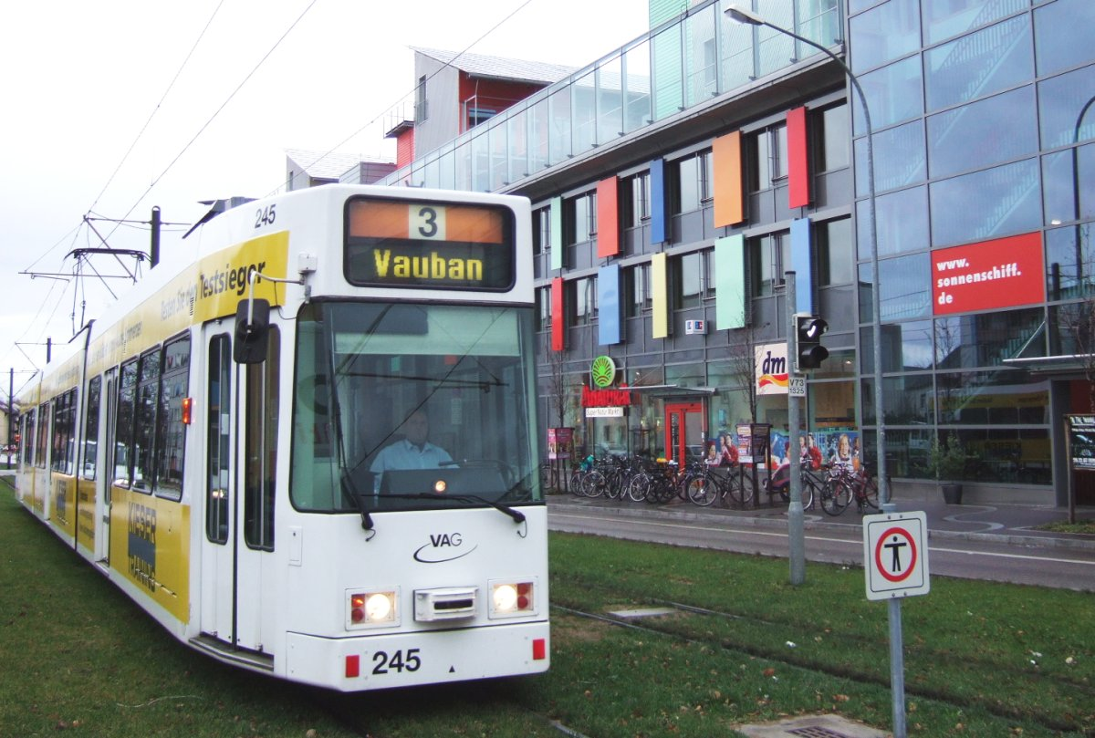 Tram n°3 dans le quartier Vauban à Freiburg